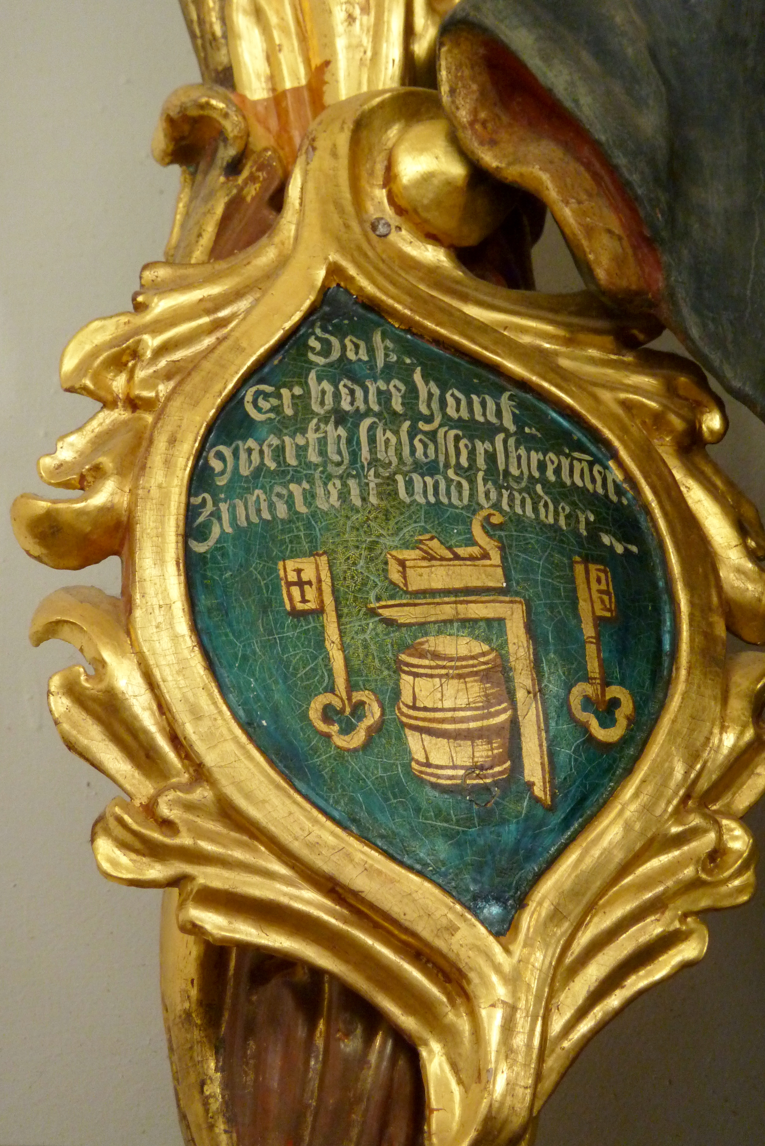 Katholische Pfarrkirche, ehemalige Prämonstratenser-Klosterkirche Mariä Himmelfahrt in Roggenburg im Landkreis Landkreis Neu-Ulm (Bayern), Skulptur des hl. Eligius, des Schutzpatrons der Hufschmiede, Detail